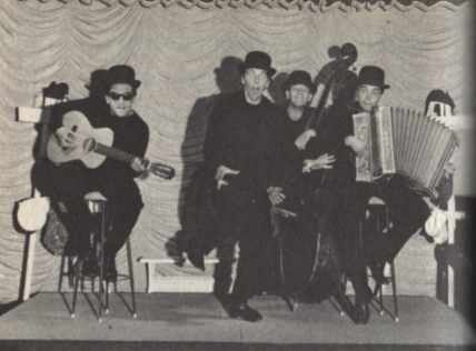 Complesso cabarettistico italiano